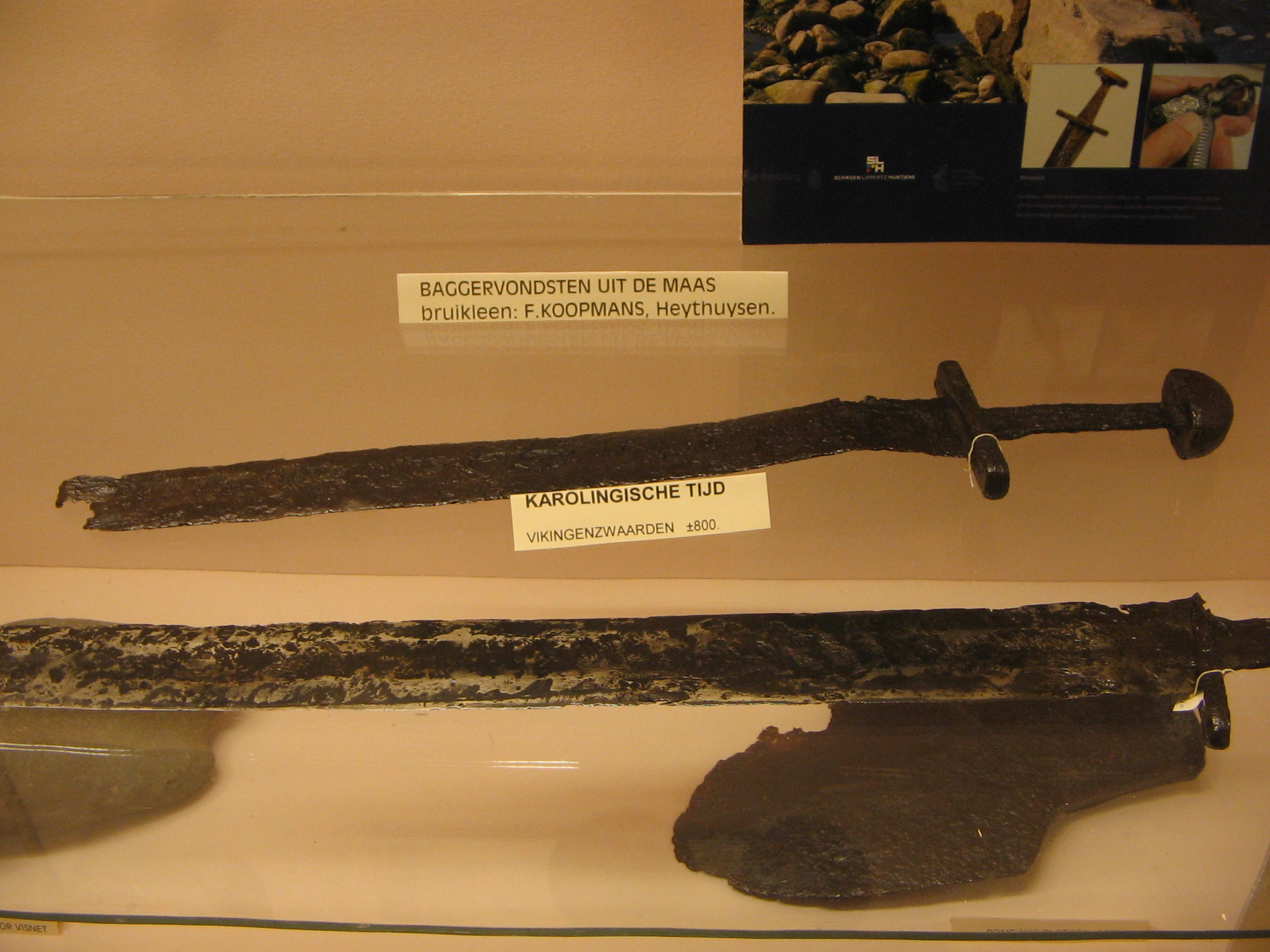 Anoniem. Twee Vikingzwaarden. Ca. 800. Metaal (ijzer?). Haelen, Leudalmuseum.